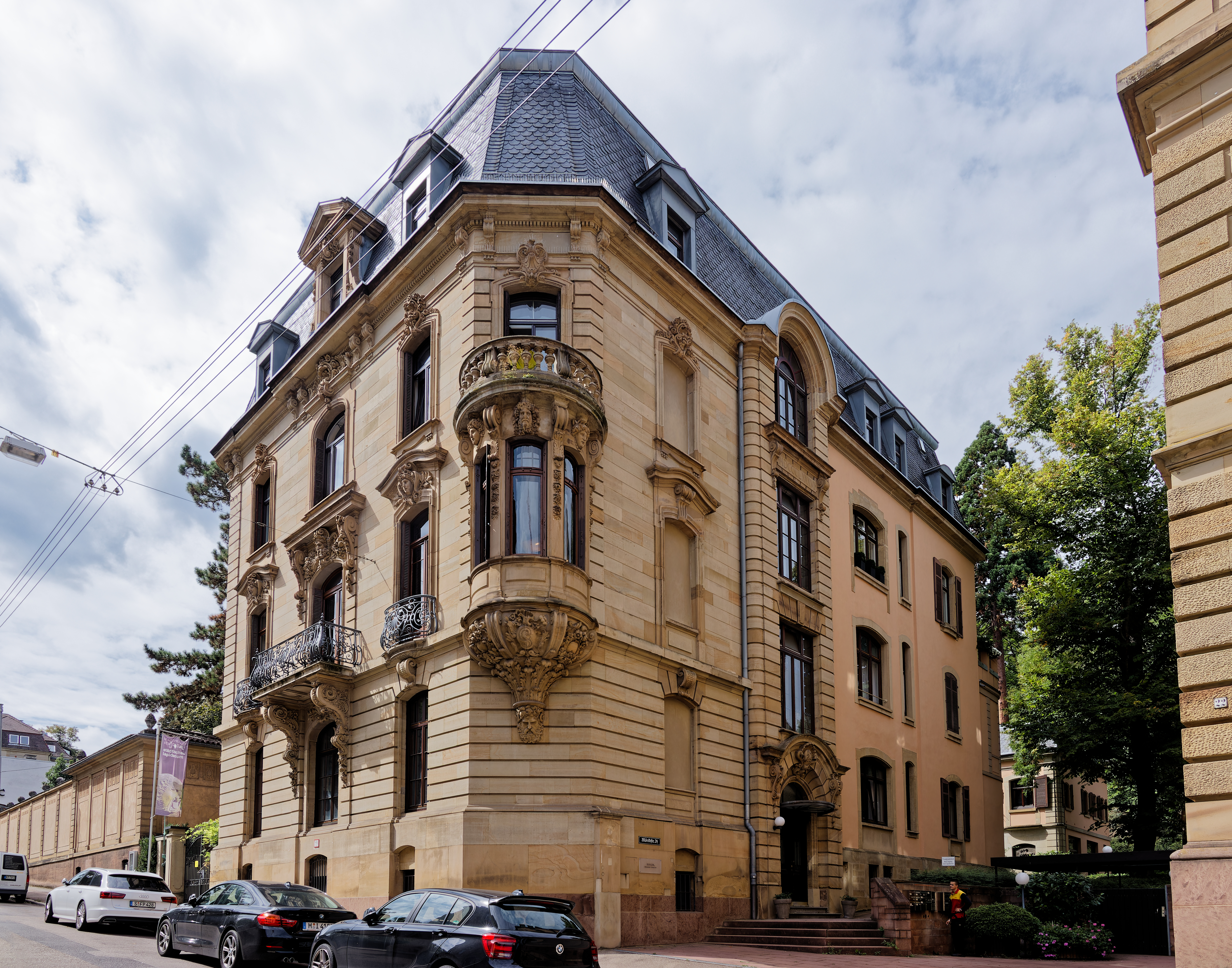 Villa Ostertag-Siegle, Mörikestraße 24 in Stuttgart. Erbaut 1886-1909 von Lambert und Stahl; Kull W.; Eitel und Steigleder. Geschützt nach § 2 DSchG.